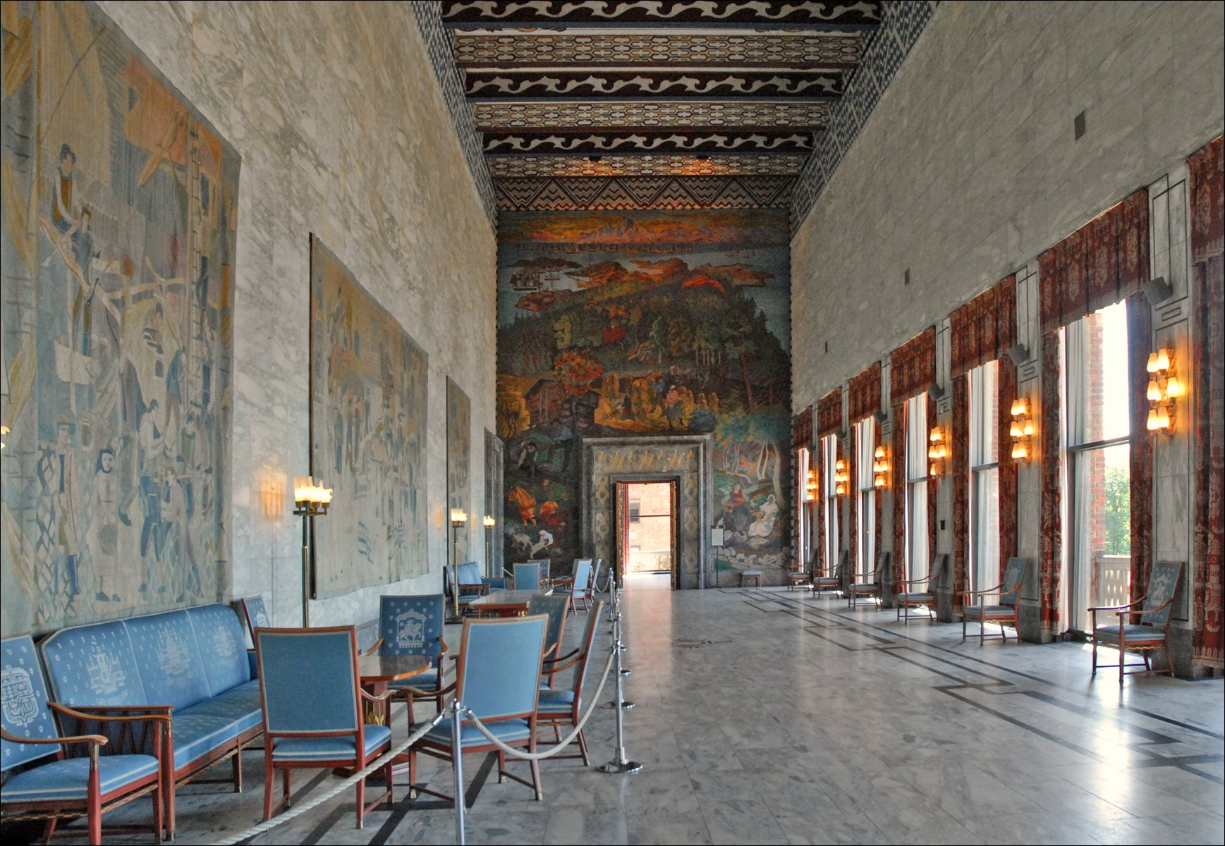 La galerie des cérémonies (Festgalleriet) Au fond, un peinture murale d'Axel Revold, intitulée "Fishing and farming". Les tapisseries au mur sont de Fredrikke Nicholaysen, elles représentent des sujets historiques. L'hôtel de ville (Rådhuset) d'Oslo a été inauguré en 1950. Il a été décoré par des artistes norvégiens de la première moitié de 20e siècle, avec des motifs tirés de l'histoire, de la culture et du monde de travail norvégiens. Il a été conçu par les architectes Arnstein Arneberg et Magnus Poulsson, en 1931 dans un style art déco scandinave mais terminé après la guerre en 1950.